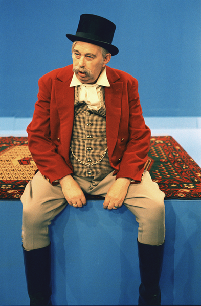 Dikke Deur, personage uit Pipo de Clown; Opname uit de beeldengeluidwiki.nl Op de set van Pipo de Clown (VARA, 1973). Archief Beeld en Geluid, catalogusnummer 73521 kb 4, fotonummer 12